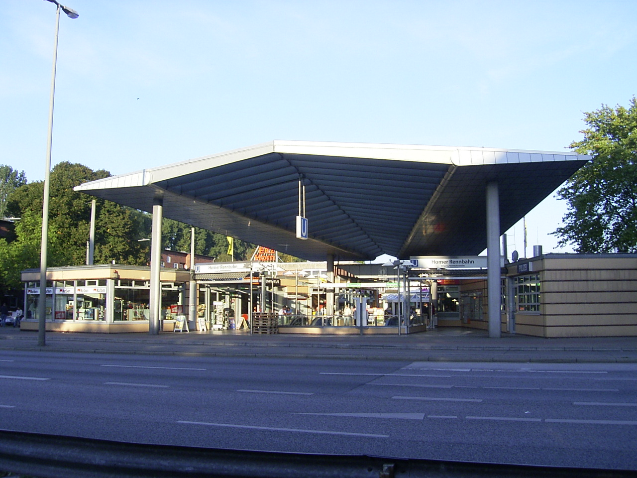 U-Bahn-Haltestelle Horner Rennbahn in Horn